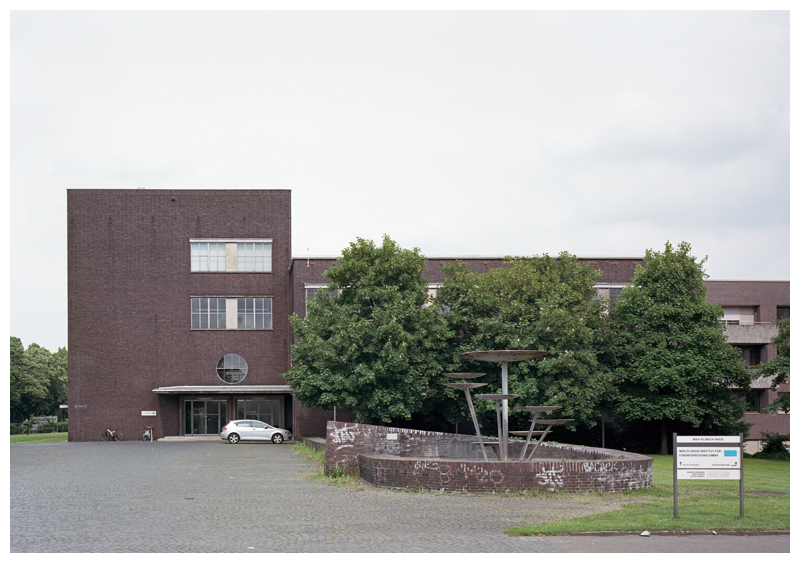 Max-Planck-Institut für Eisenforschung in Düsseldorf